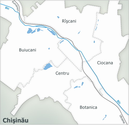 Karte Chișinău, Moldawien